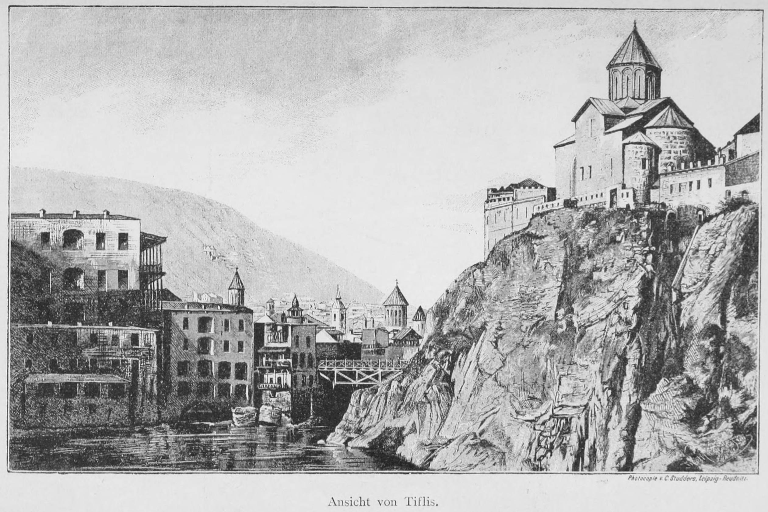 „Ansicht von Tiflis“